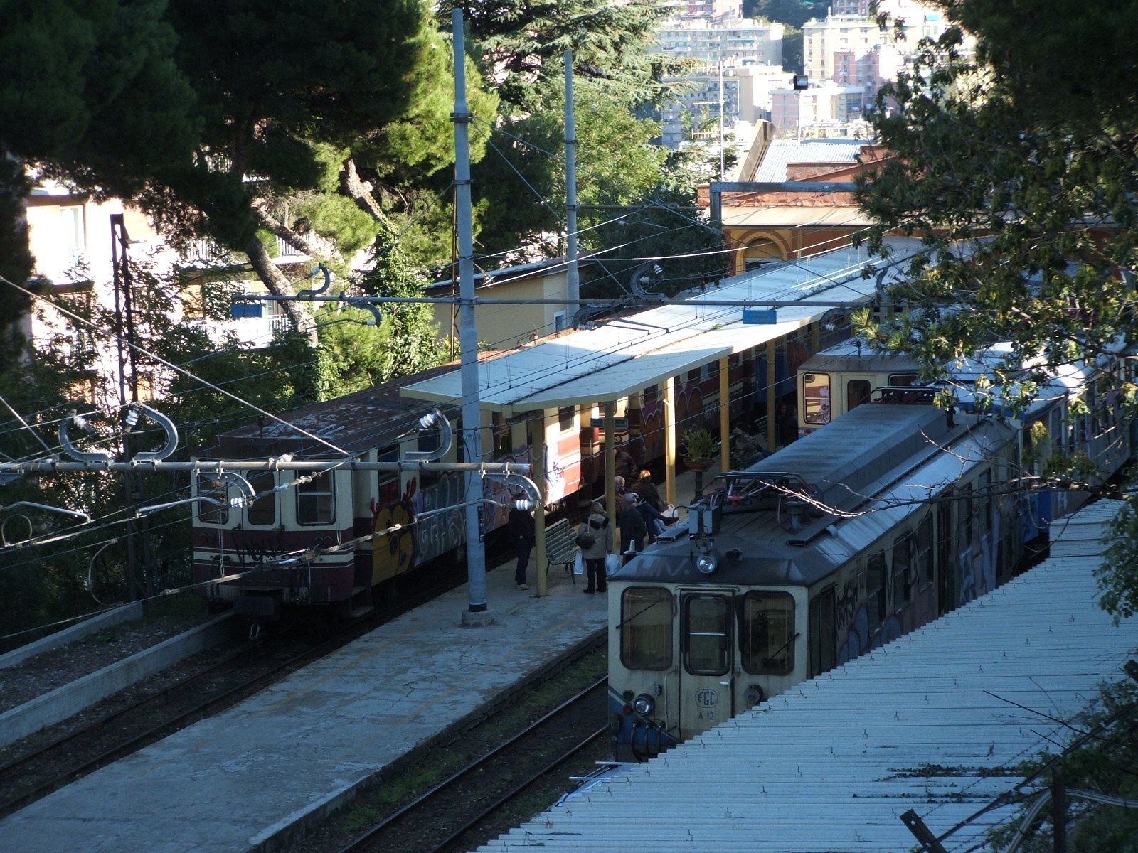 Immagine da Genova